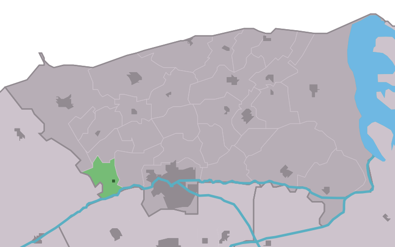 Kaartsje fan himrik fan Raard